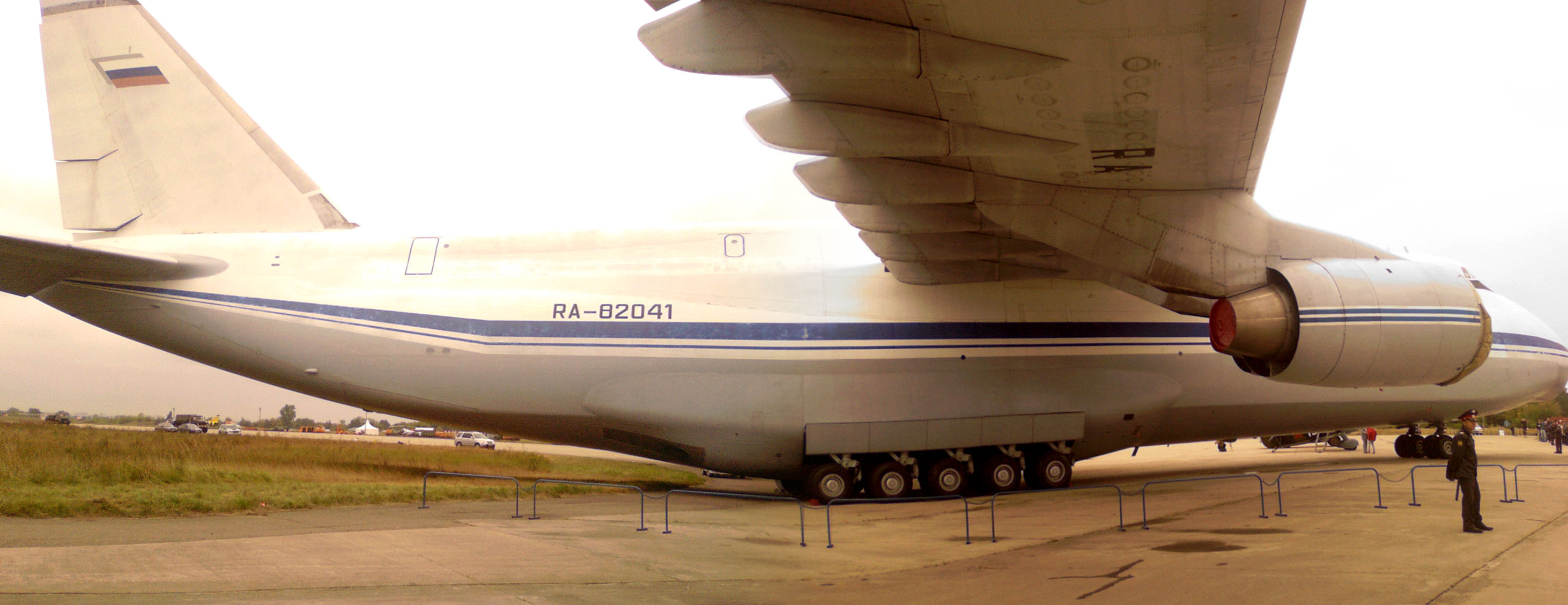 Ан-124 Руслан МАКС-2009